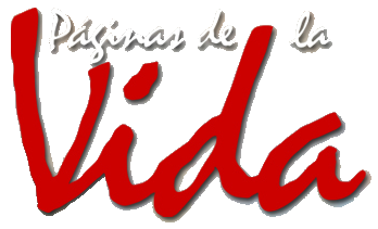 Logo de la telenovela brasileña Páginas de la vida